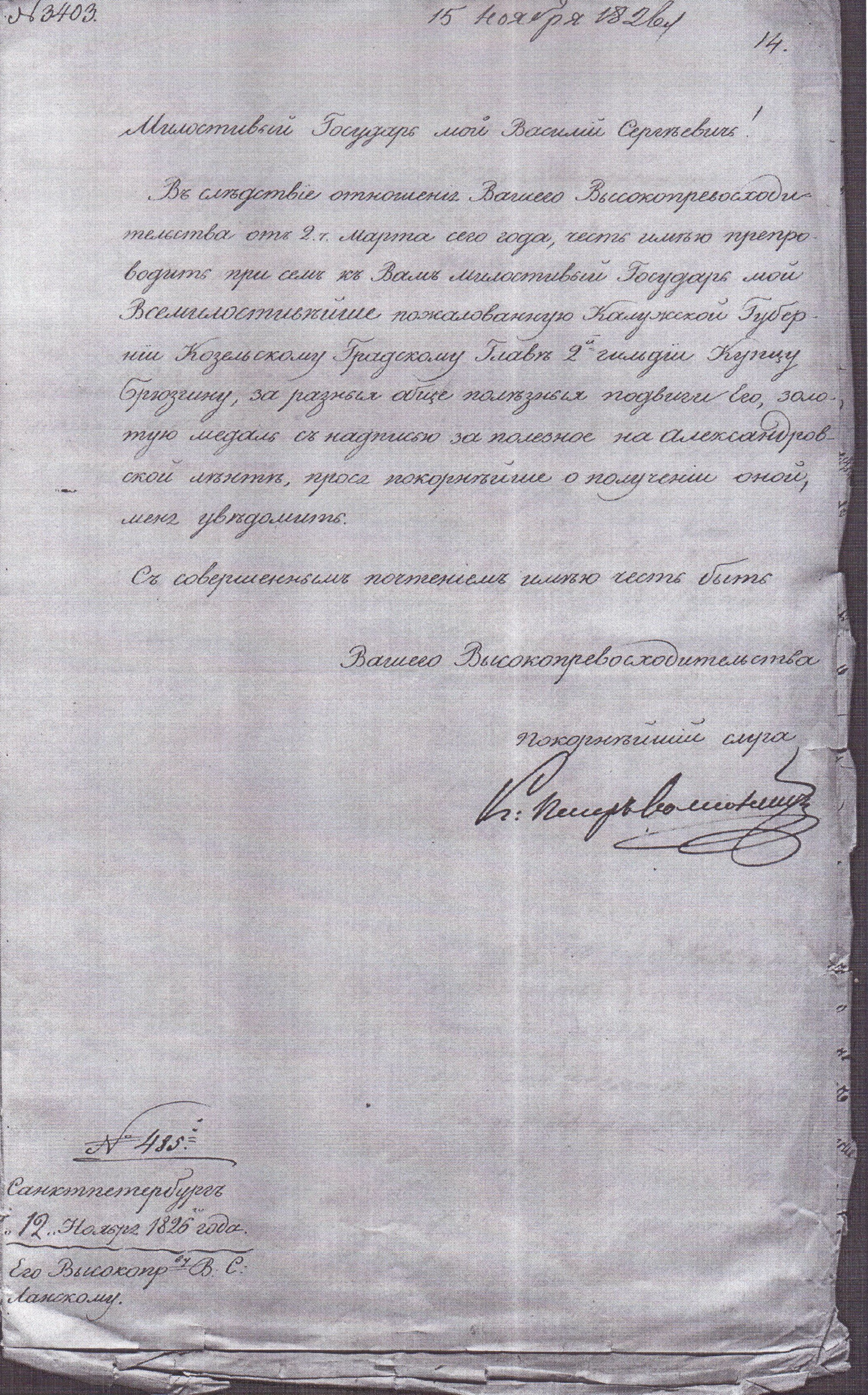 Письмо о награде для статьи Брюзгин, Дмитрий Васильевич отправитель Волконский, Пётр Михайлович, получатель Ланской, Василий Сергеевич текст: Милостивый государь мой Василий Сергеевич! Вследствие отношения Вашего Высокопревосходительства от 2 марта сего года, честь имею препроводить при сём к Вам милостивый Государь мой Всемилостевийше пожалованную Калужской Губернии Козельскому Градскому Главе 2-й гильдии купцу Брюзгину, за разные общеполезные подвиги его, золотую медаль с надписью за полезное на Александровской ленте, прося покорнейше о получении оной, меня уведомить. С совершенным почтением имею честь быть Вашего Выскокопревосходительства покорнейший слуга кн. Петр Волконский №485 Санкт-Петербург 12 ноября 1826 года Его Высокопр. В. С. Ланскому